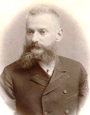 Dragutin Faranasović -srpski general i ministar vojni